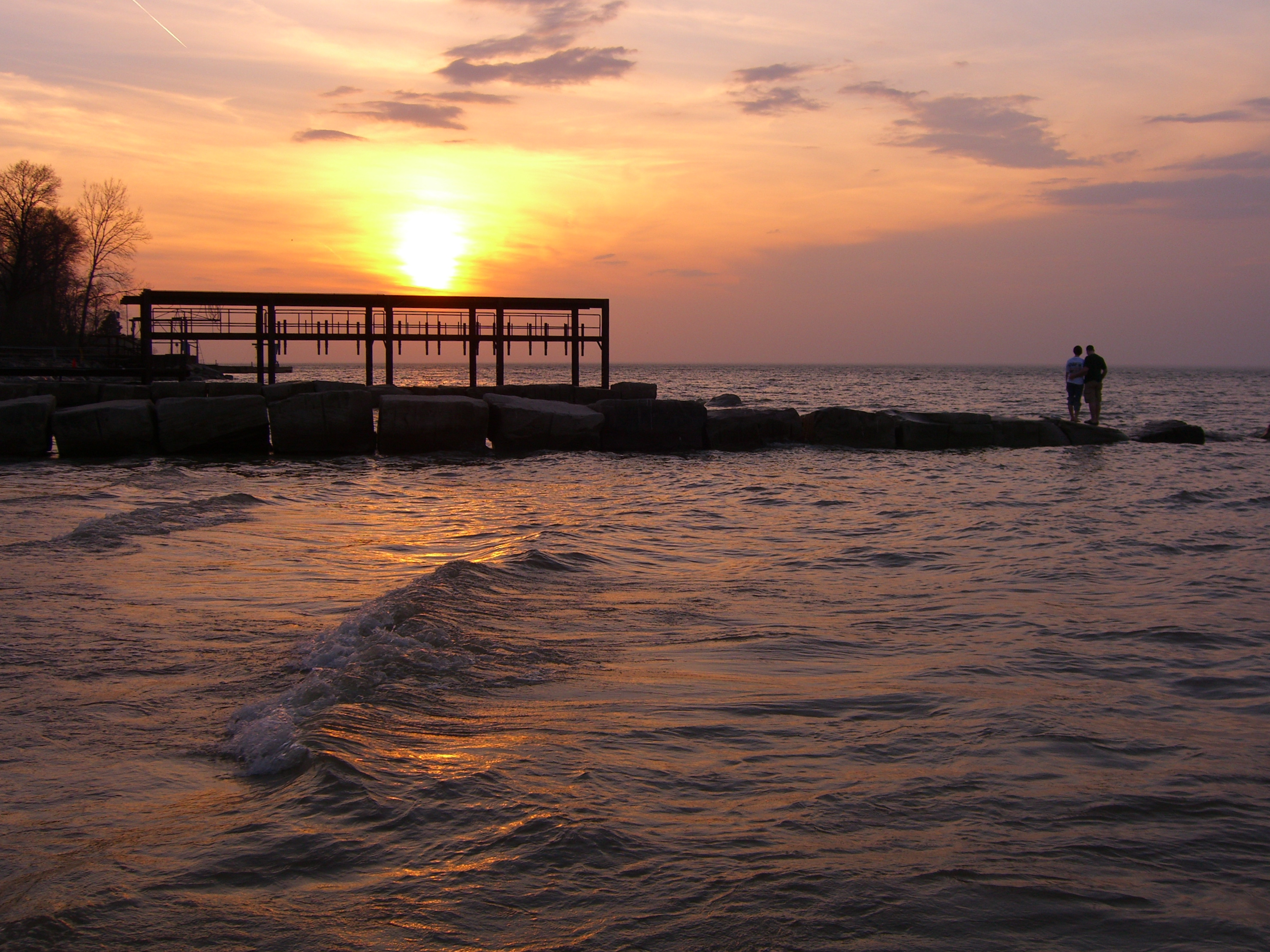 Veterans Park, Avon Lake, OH